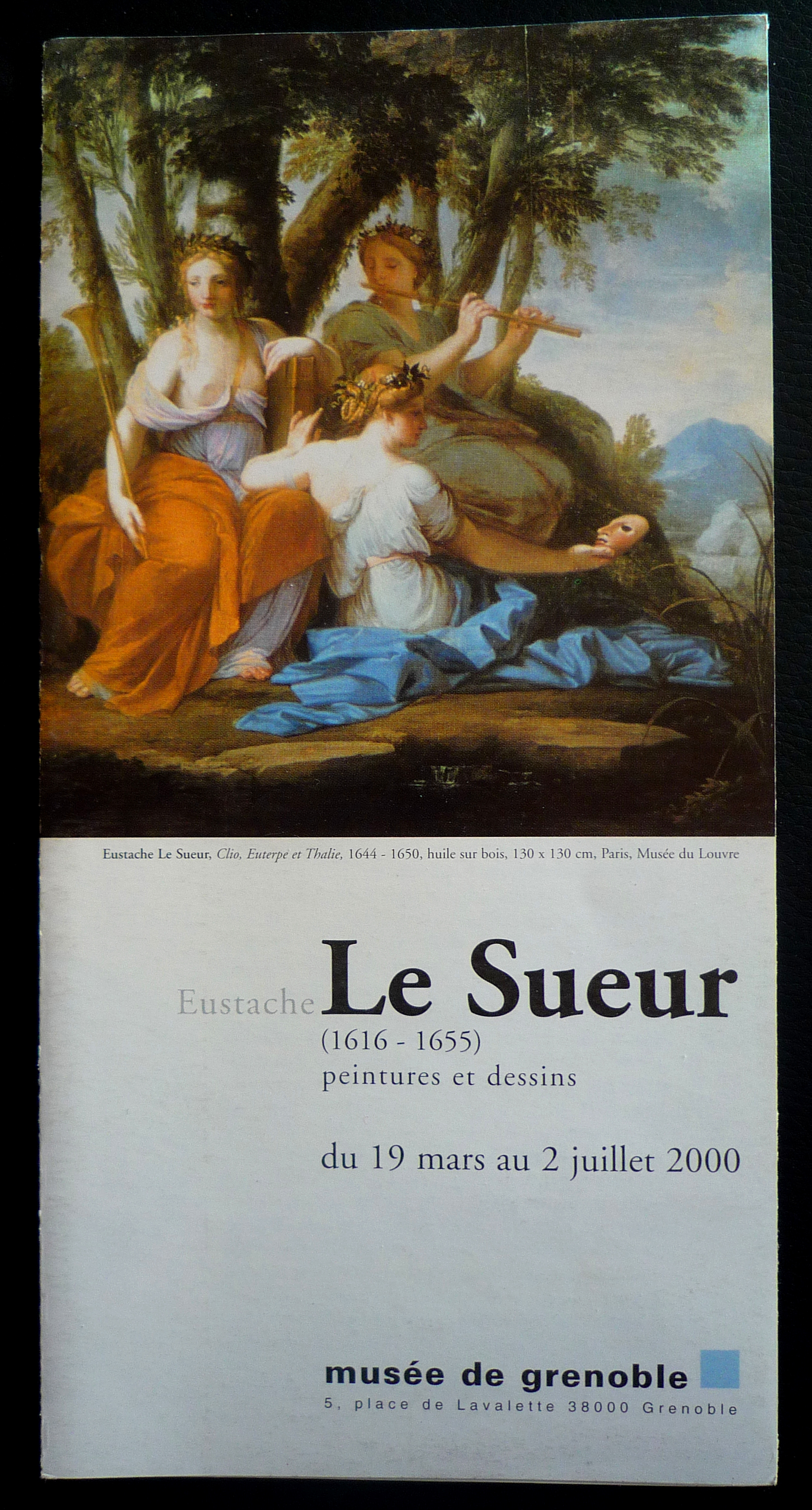 Plaquette exposition Le Sueur en 2000, Musée de Grenoble.